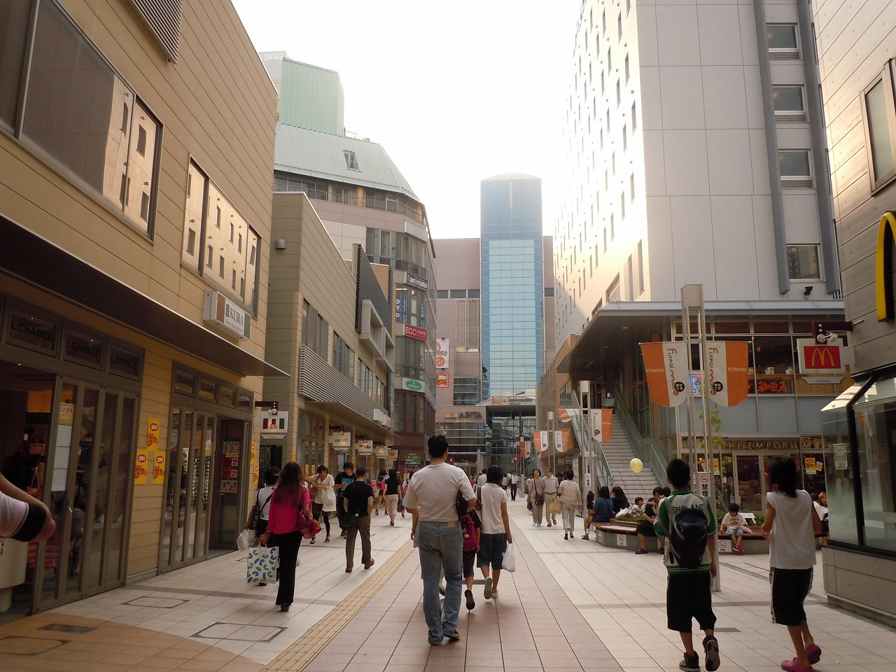 昨年、四日市市街地再開発によって新しくなった歩行者専用の道路です